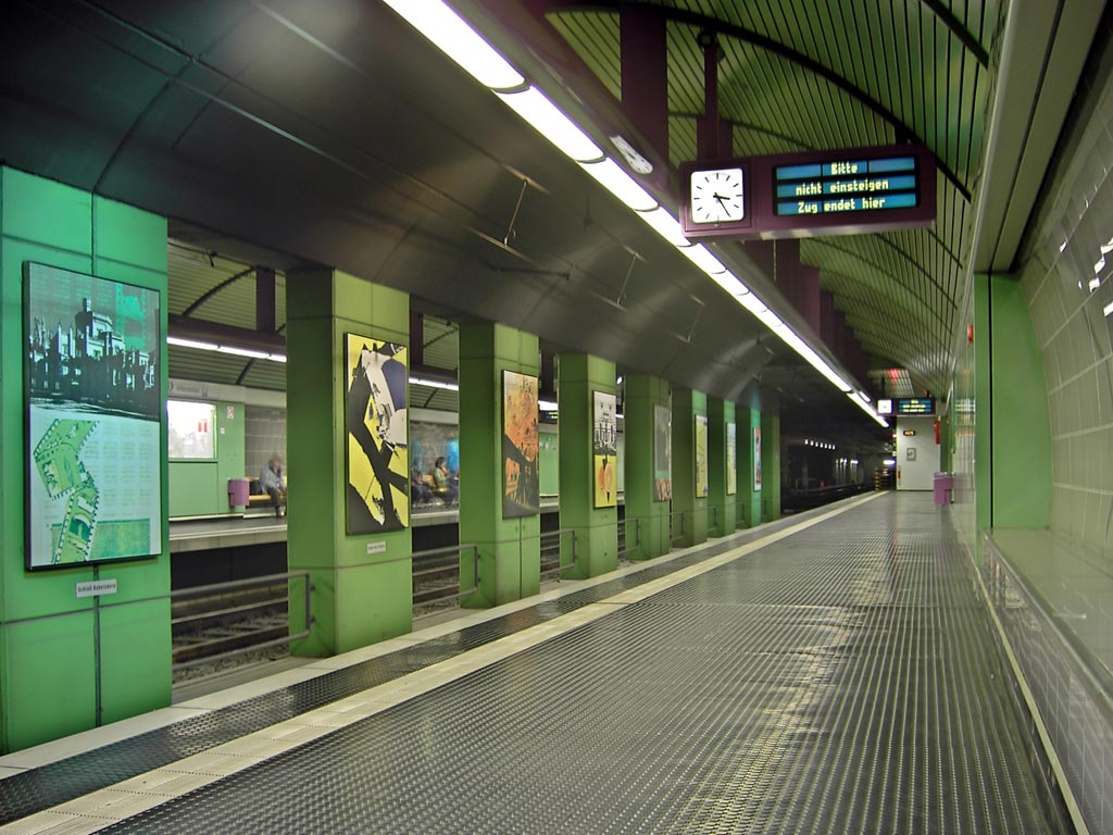 Stadtbahnstation Stadthalle in Bonn